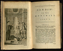 Candide English Edition 1762